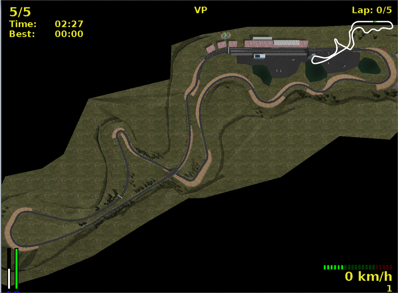 Captura de pantalla del videojoc TORCS